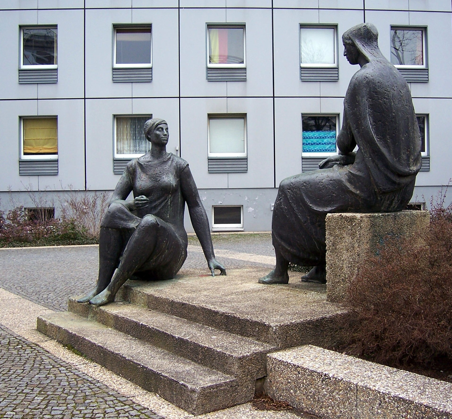 Plastik Zwei Frauen von Wieland Förster vor den Studentenwohnheimen St. Petersburger Straße 25 in Dresden